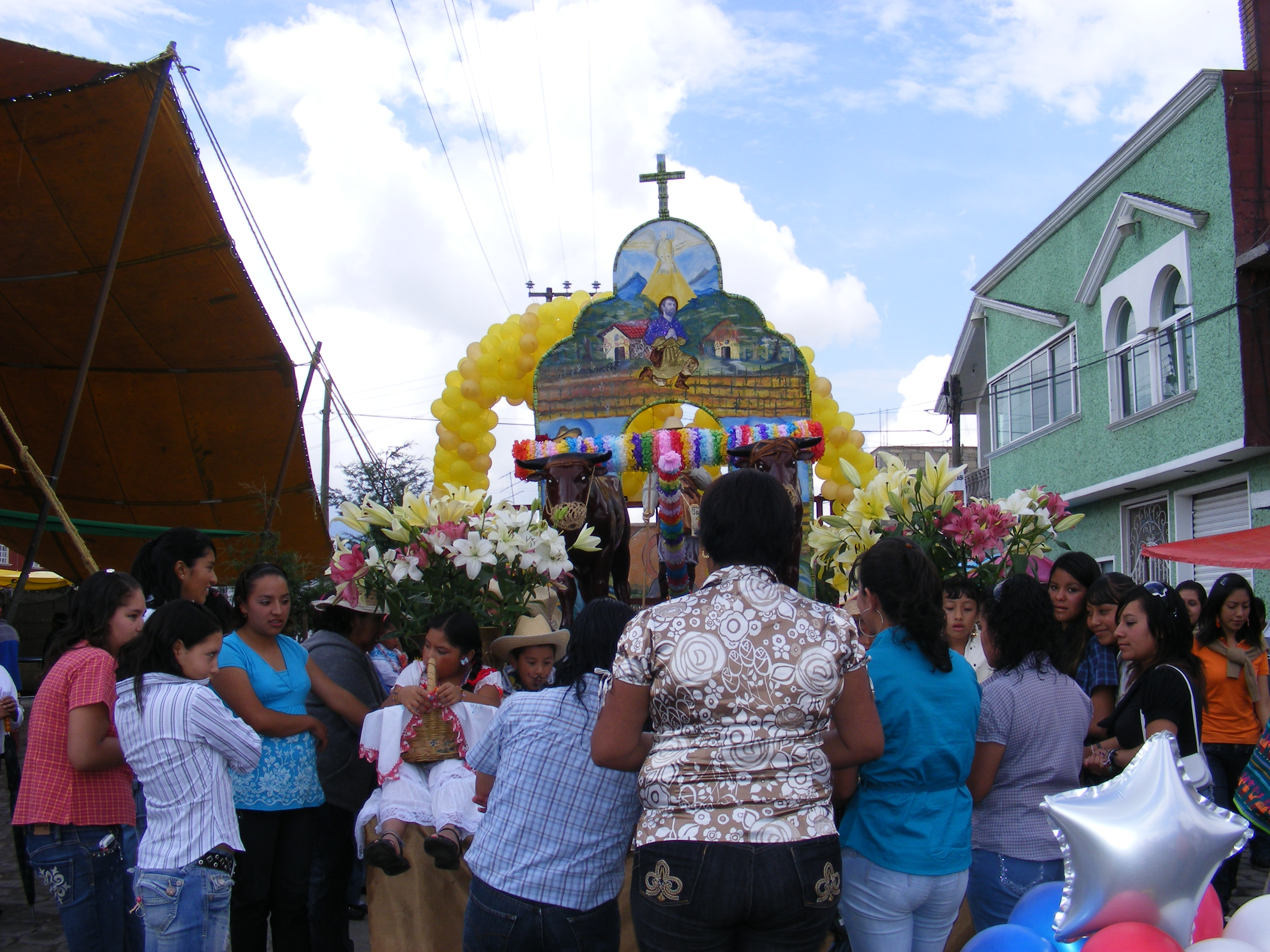 san isidro